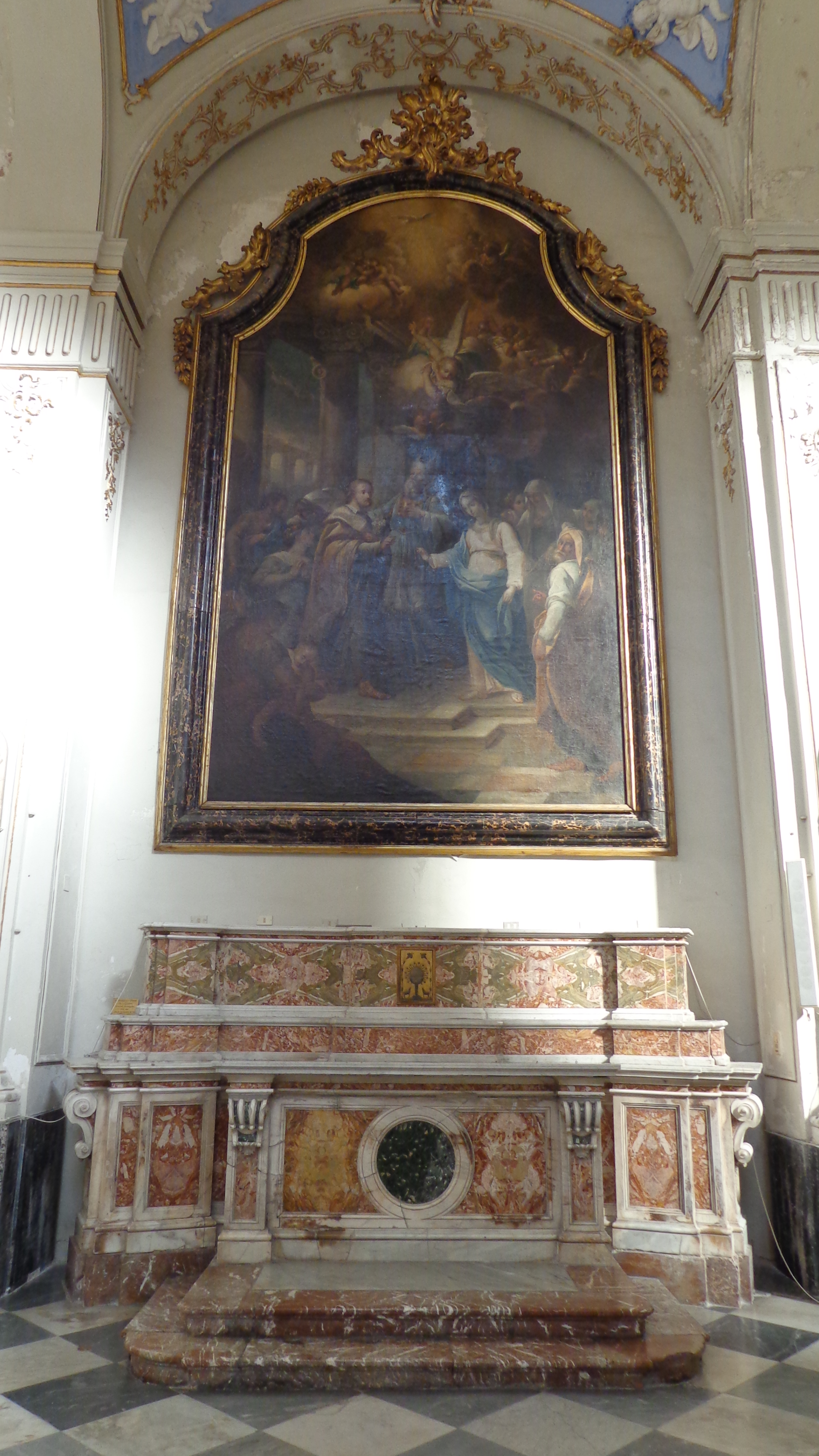 Altare